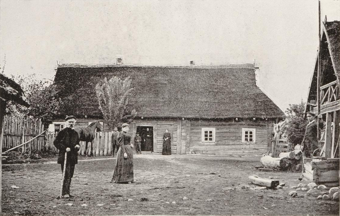 Беларуская (тарашкевіца): Далматаўшчына (Dałmataŭščyna)